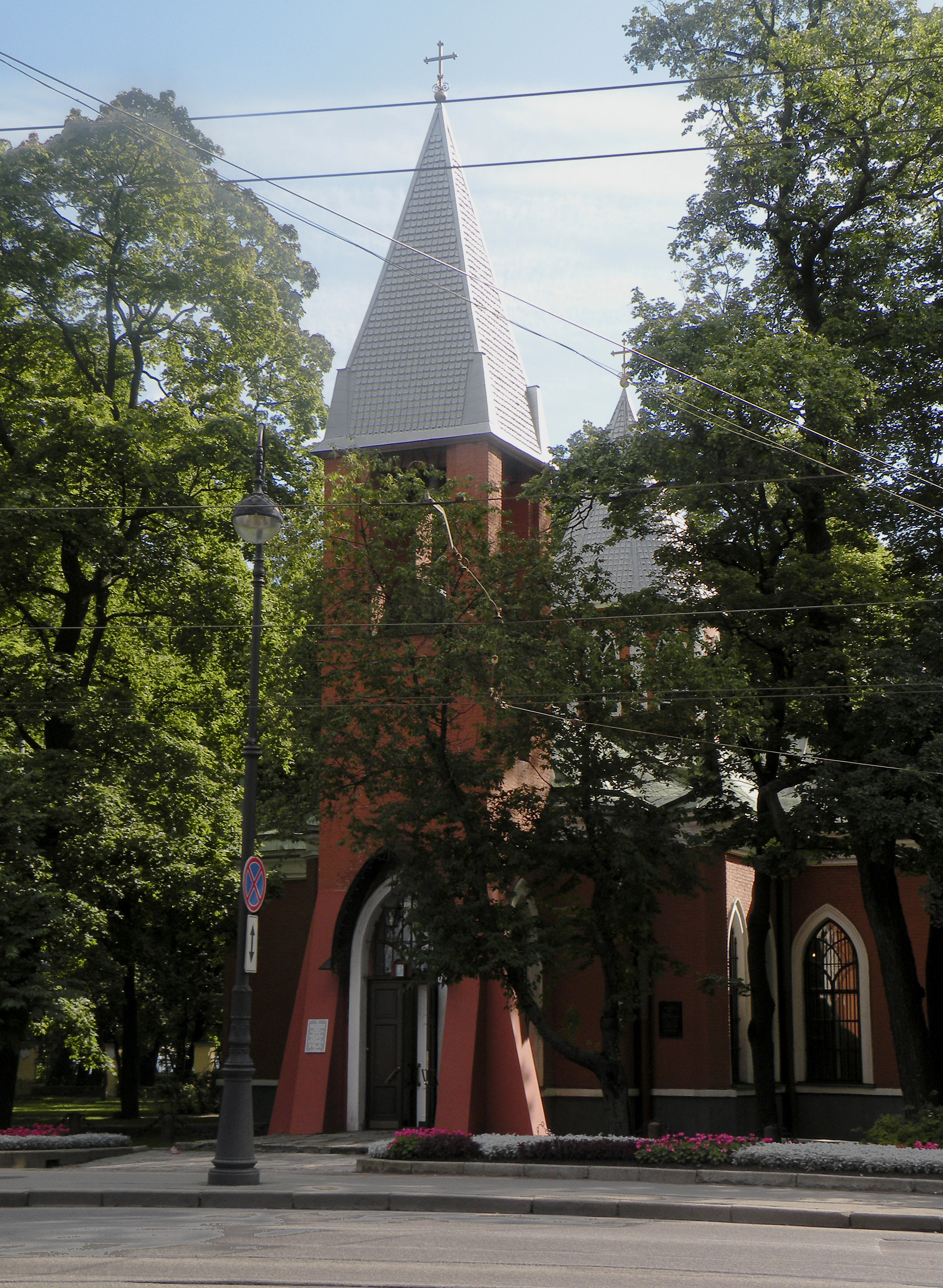 Церковь Рождества Иоанна Предтечи при Каменноостровском дворце